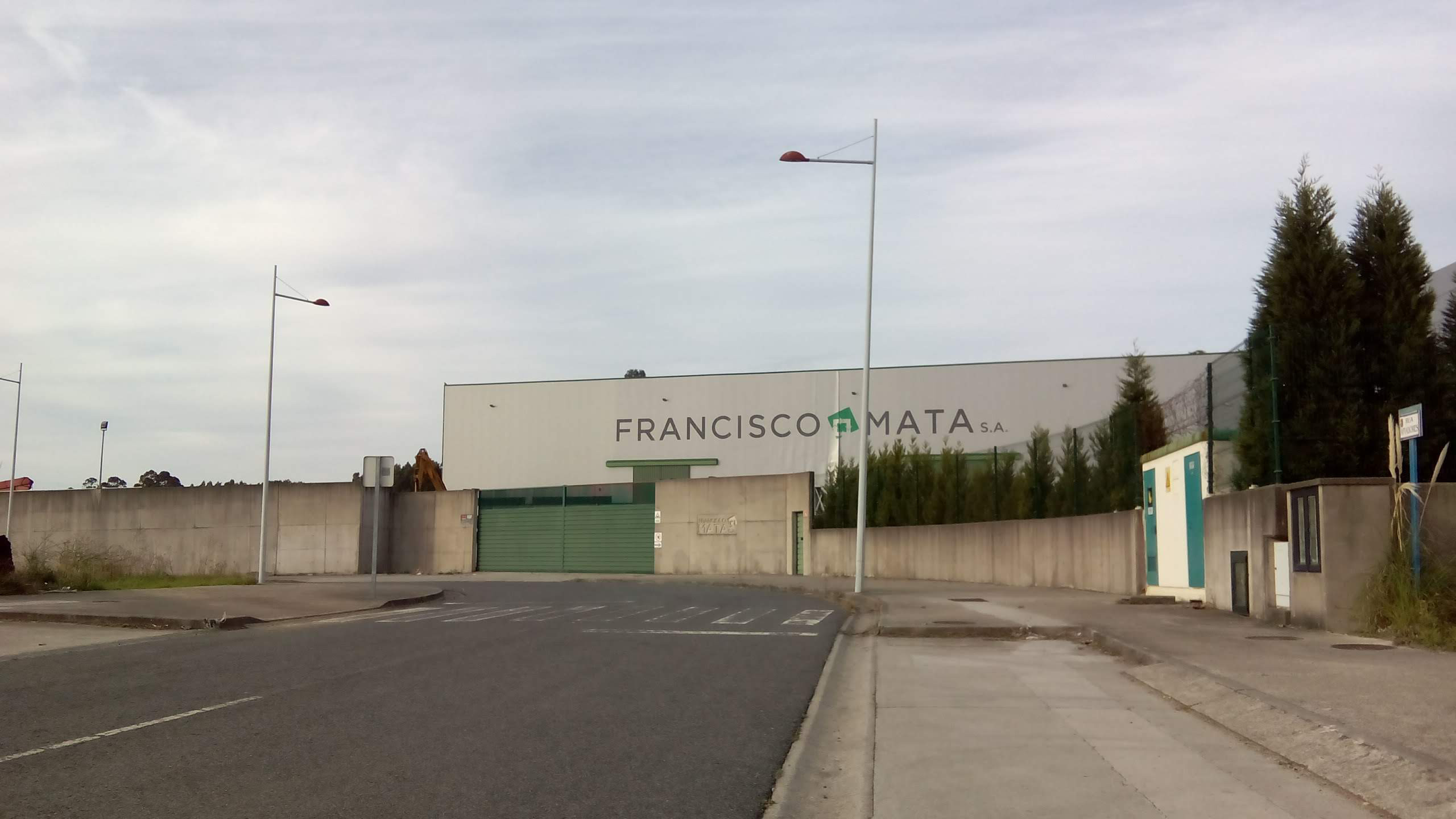 FMata en Río do Pozo, Narón.